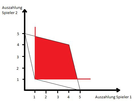 FOLKTheorem